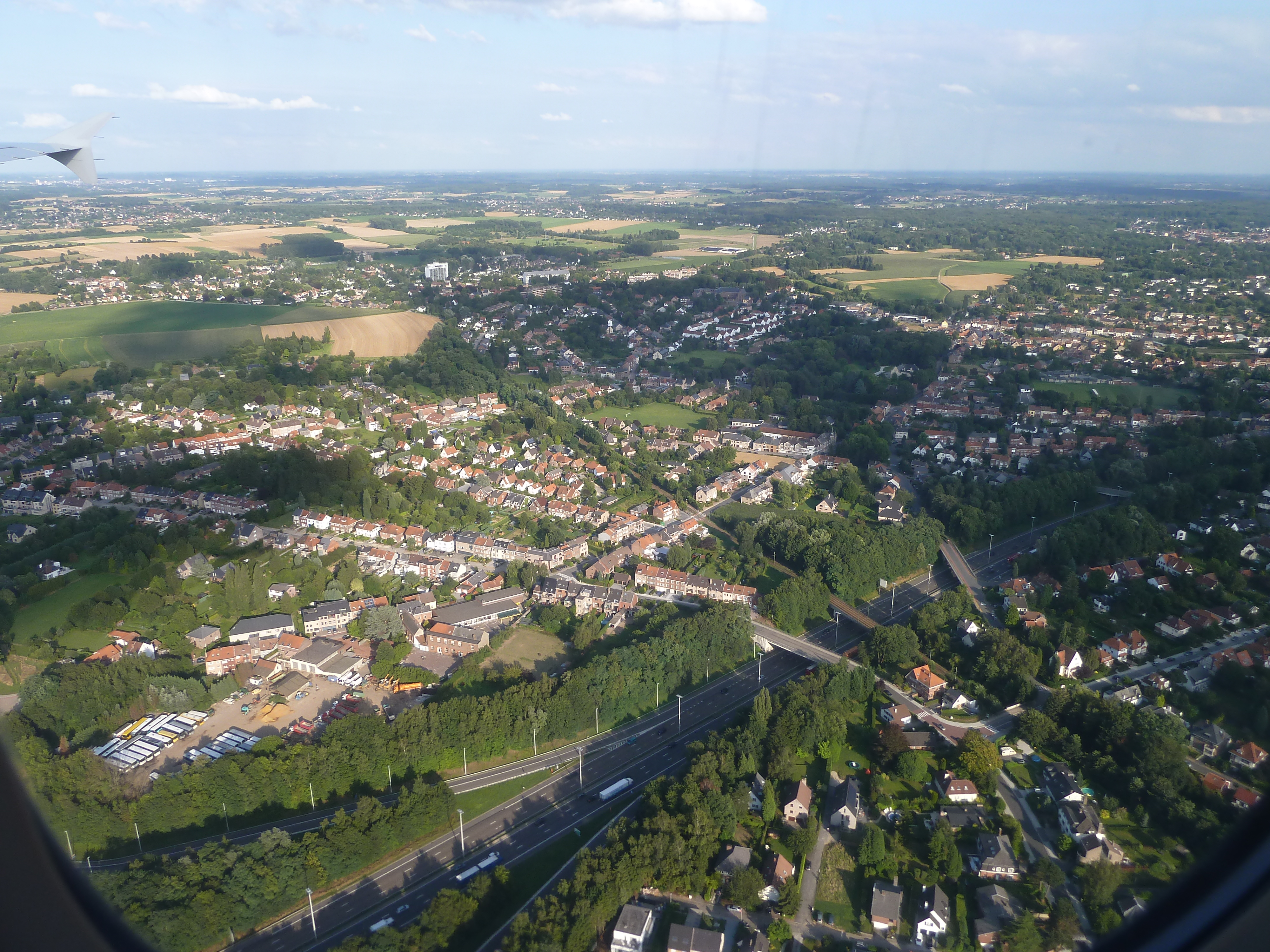 Ring Wezembeek-Oppem